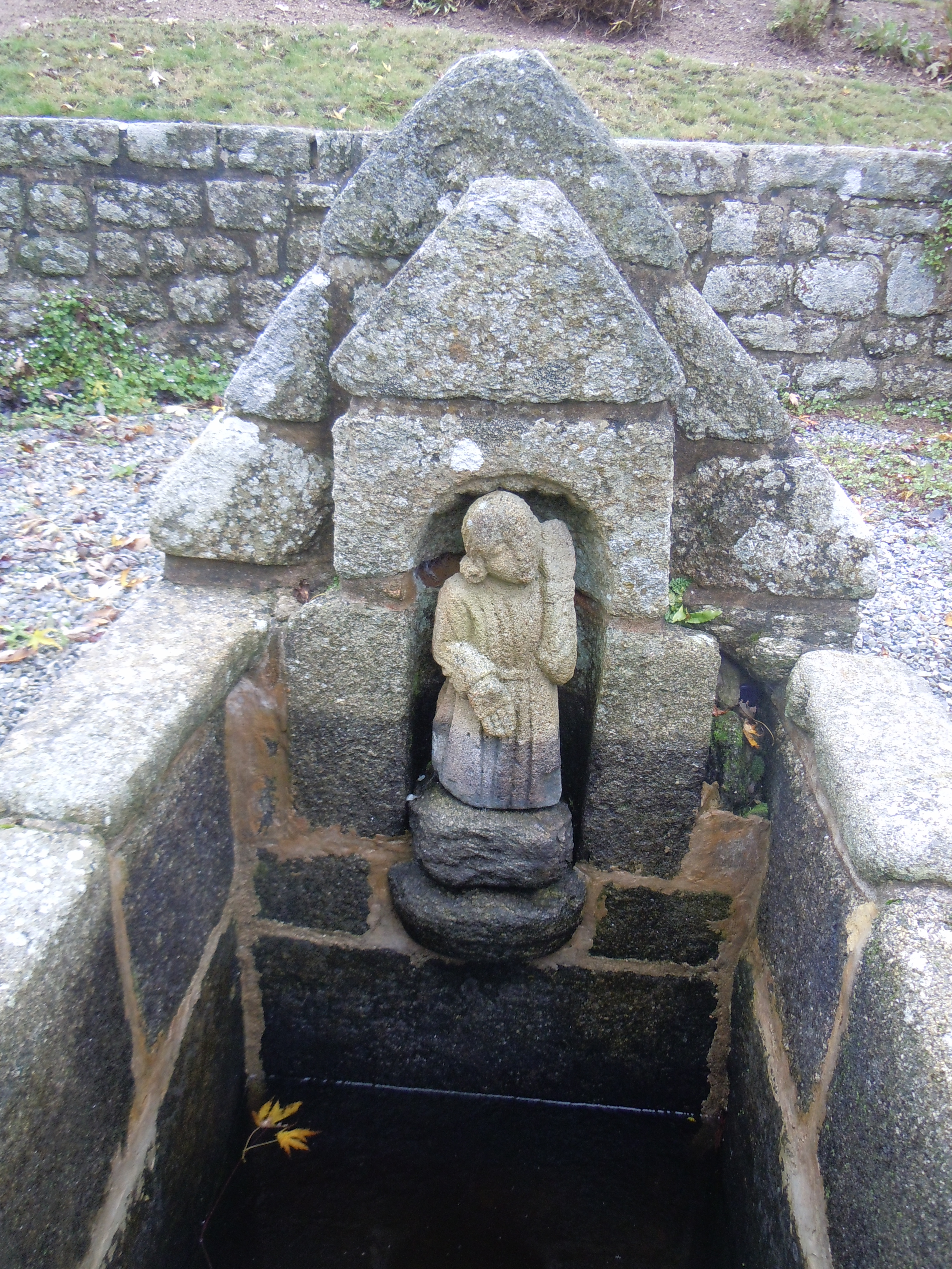 statue de Saint Diboen située dans la niche de la fontaine de dévotion du village Bonigeard à Meslan (département du Morbihan).Le saint porte une aumonière à la ceinture.